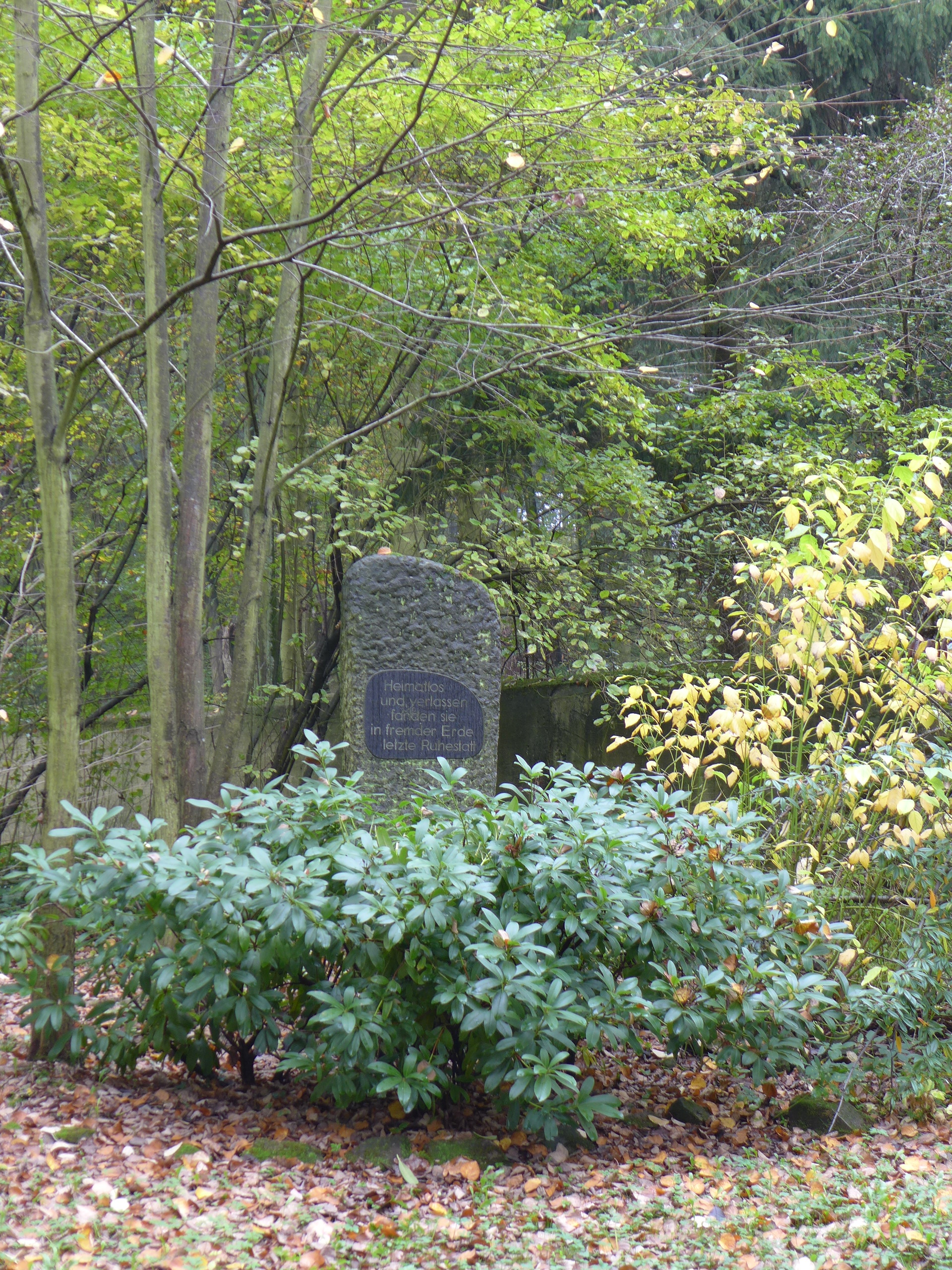 Diefflen, Jüdischer Friedhof